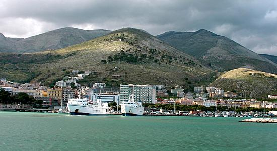 Formia (provincia di Latina, Lazio, Italia) e i suoi monti vista dal mare